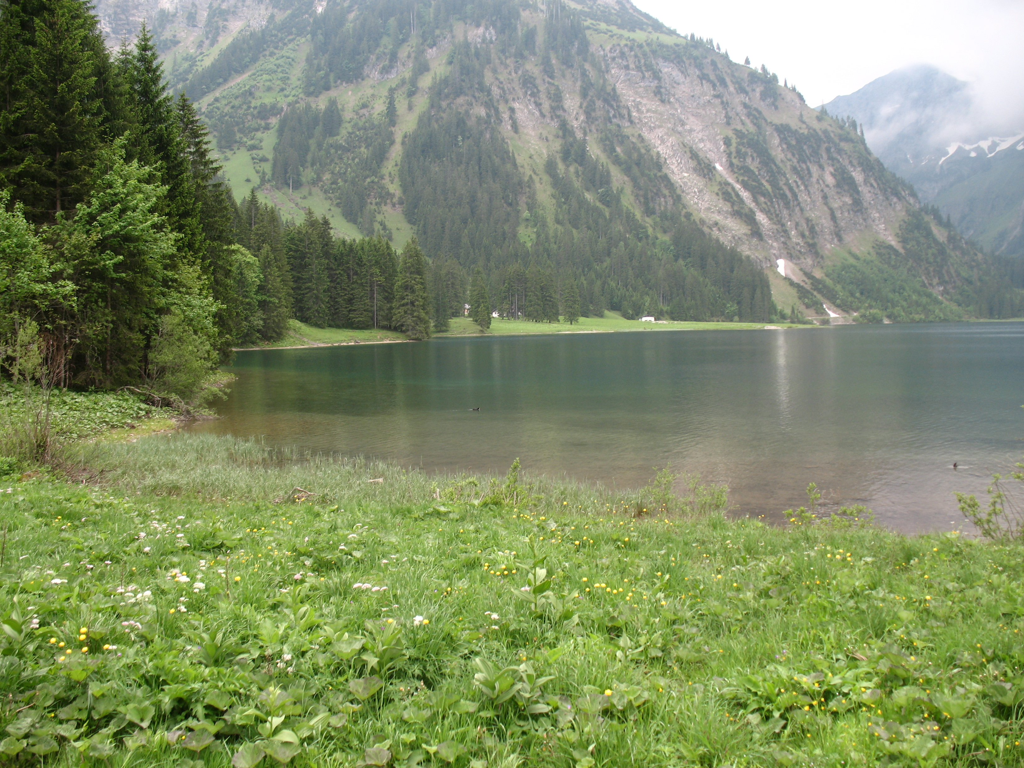 Uferflora am Vilsalpsee mit Blässhuhn.